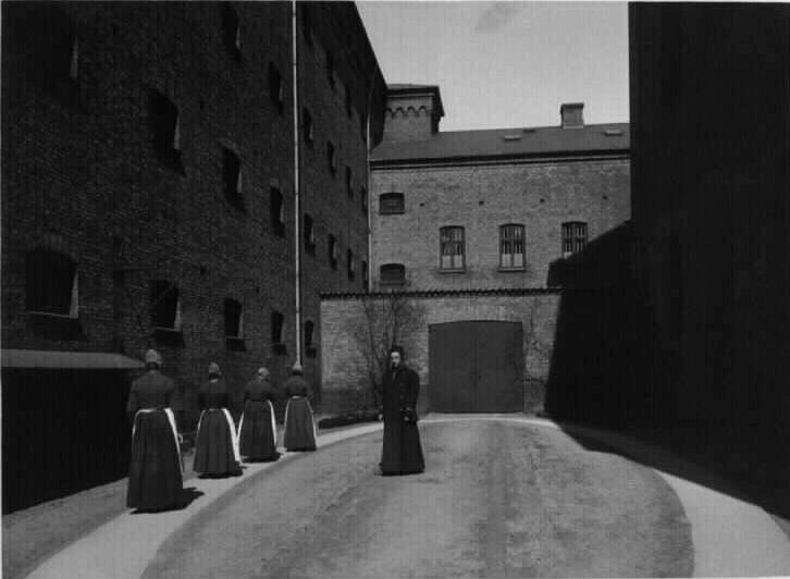 Fængselsgården i Kvindefængslet på Christianshavns Torv, København.